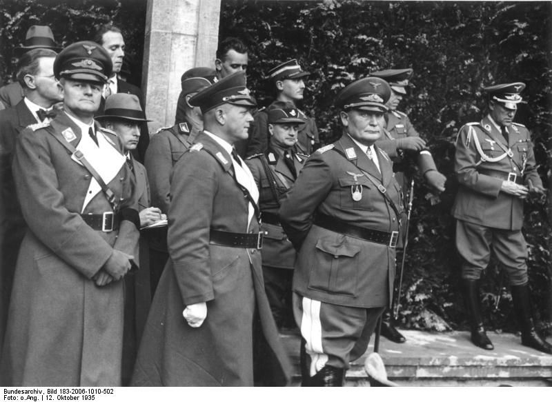 Scherl: Richtfest des Reichsluftfahrtministeriums Der Reichsluftfahrtminister General der Flieger Göring und Staatssekretär Generallt. Milch während der Feier.